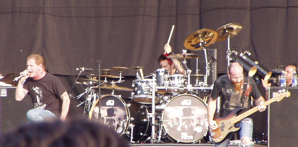 Gli Stone Sour all'Heineken Jammin' Festival 2007